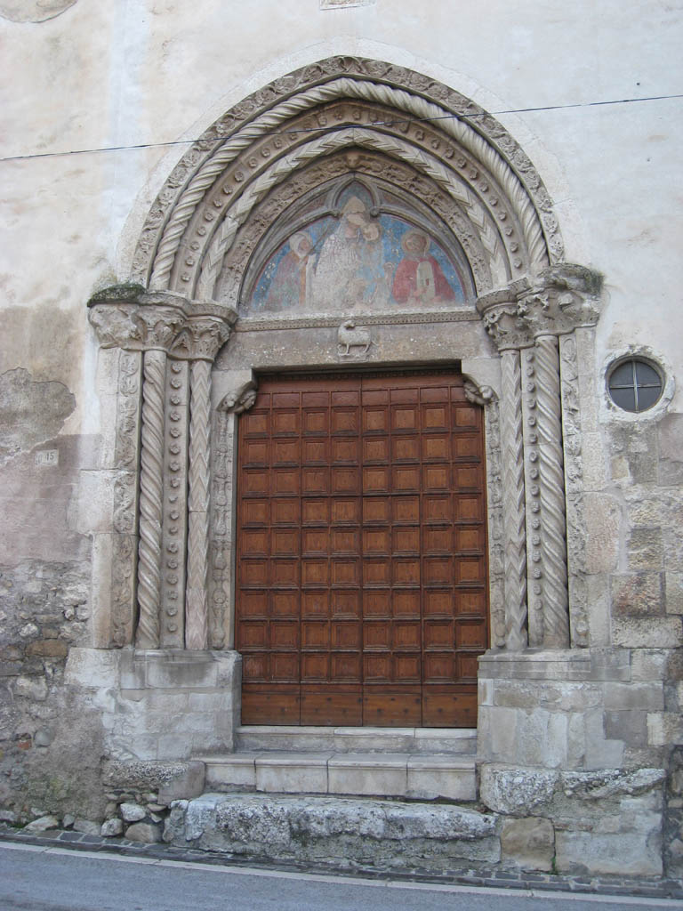 Portale tardo gotico della Chiesa di San Marcello ad Anversa degli Abruzzi.